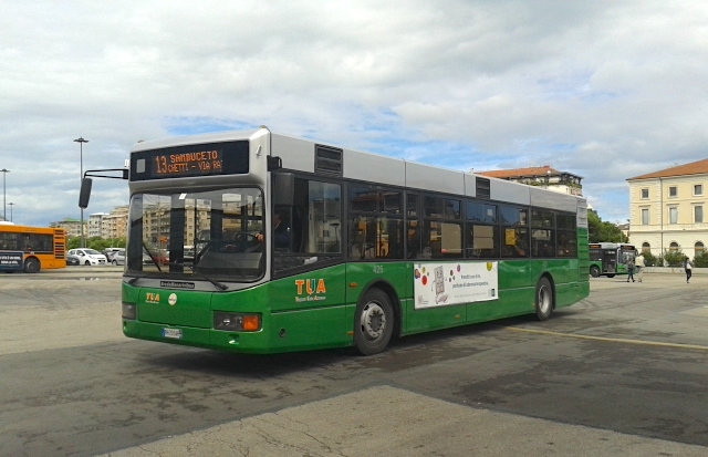 Matricola 425, il primo mezzo a portare il nuovo logo della TUA